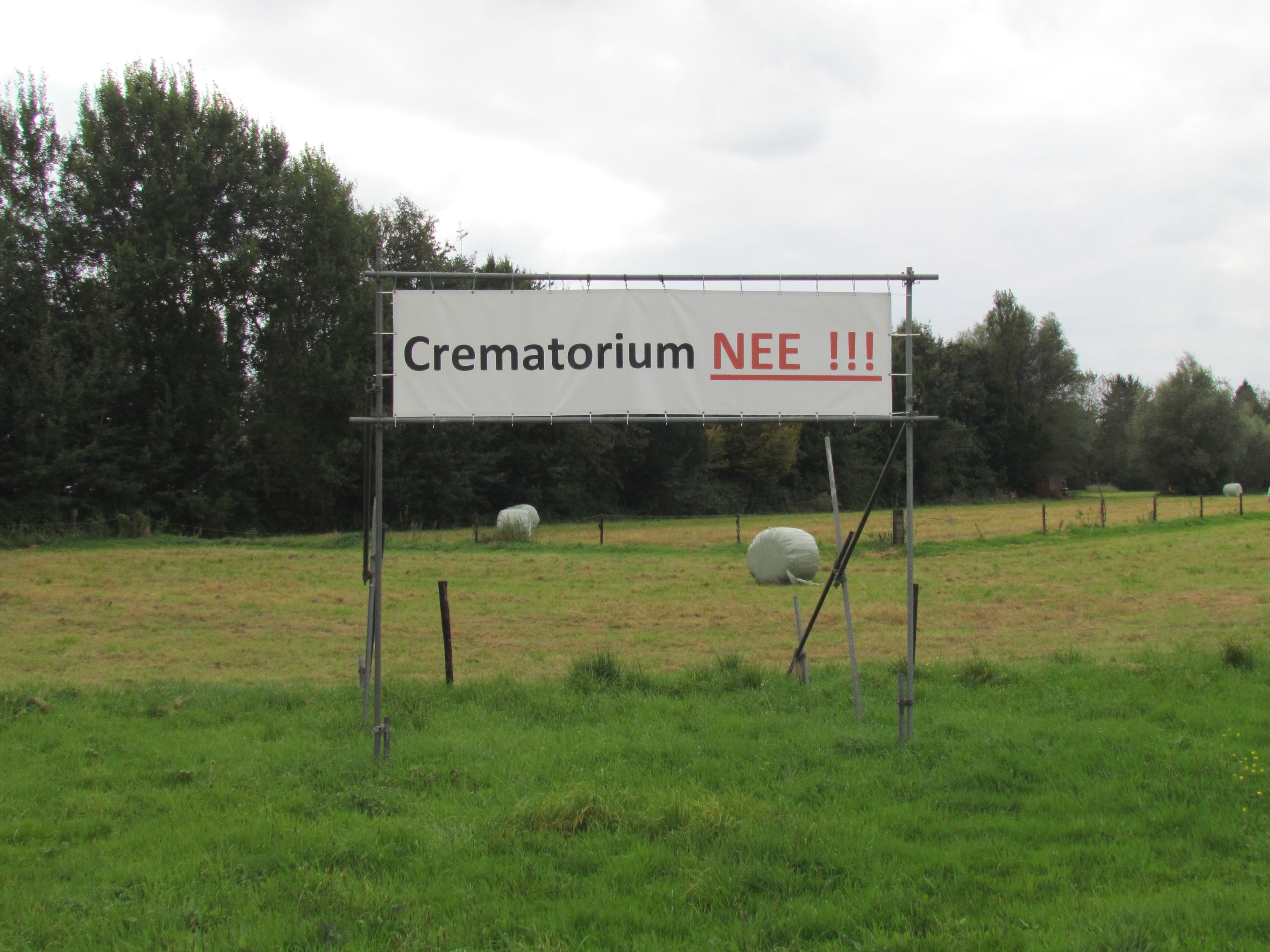 Protestspandoek in een Nederlands agrarisch gebied